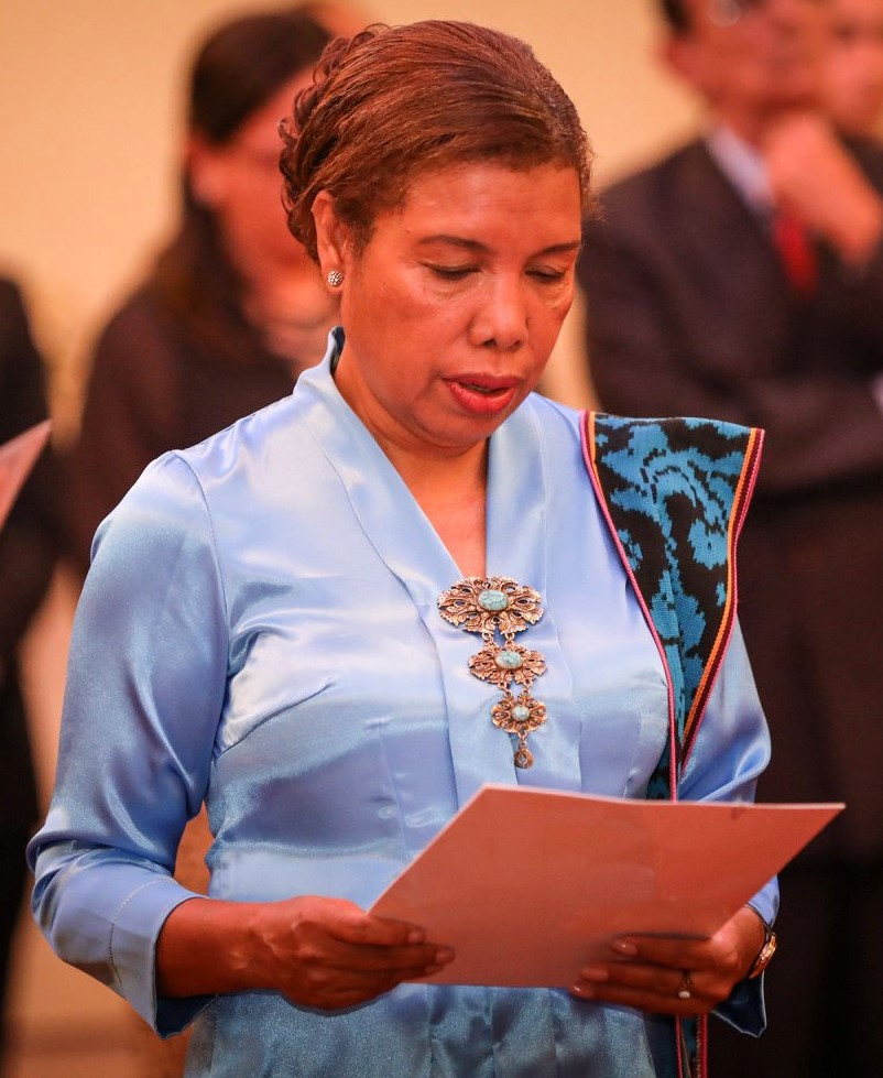 Botschafterin Maria Renata de Jesus bei der Vereidigung